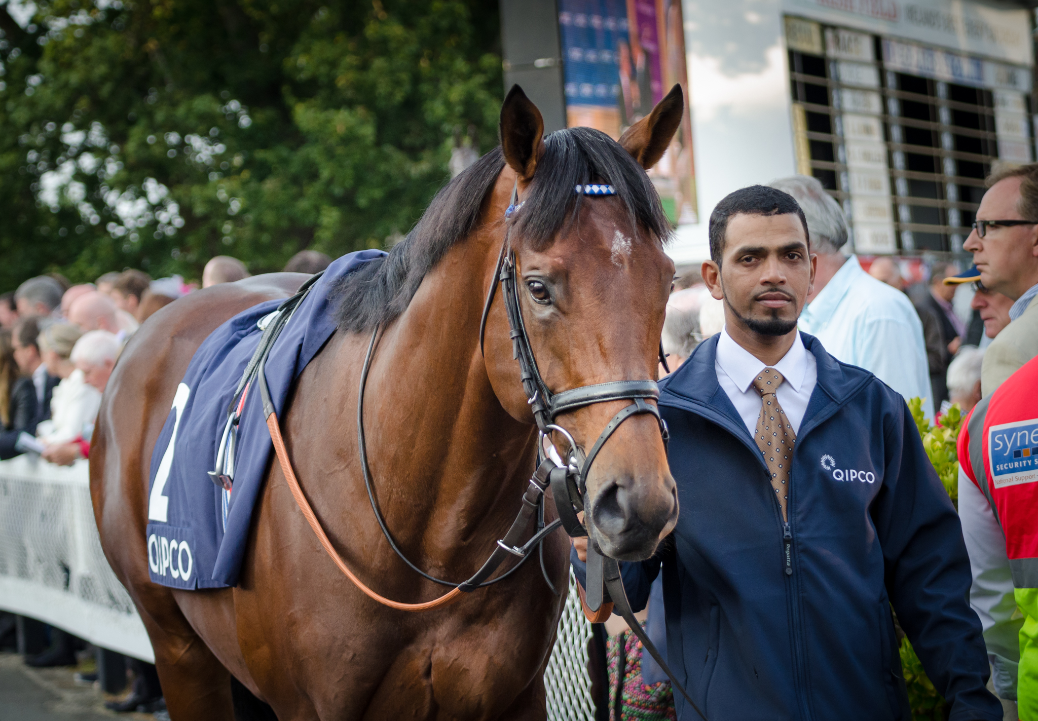 Mukhadram